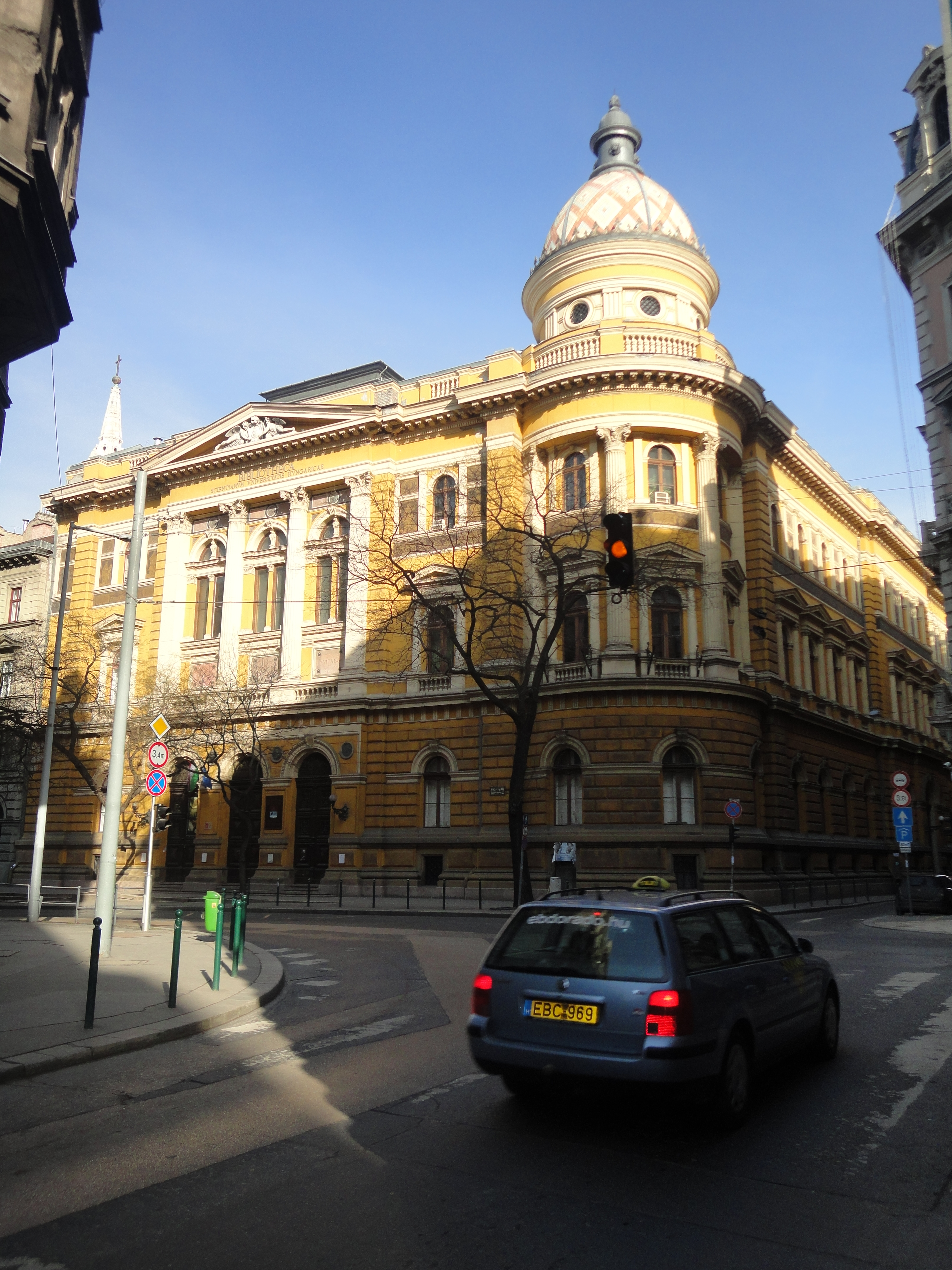 Egyetemi Könyvtár This is a photo of a monument in Hungary. Identifier: 466